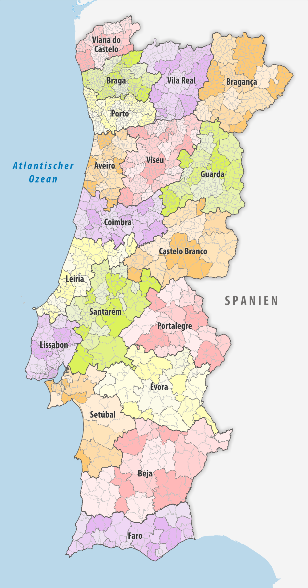 Portugals Distrikte, Kreise und Gemeinden